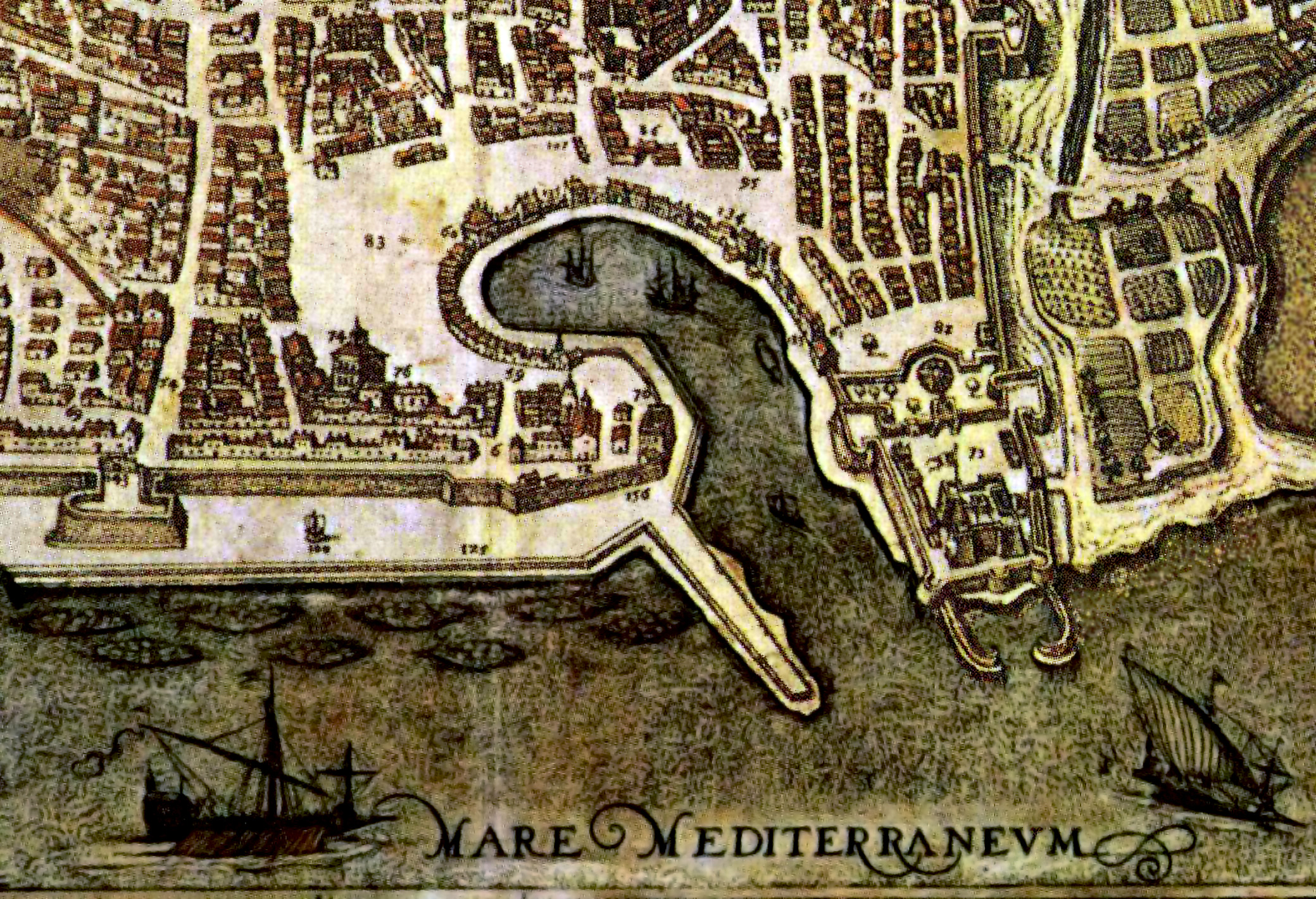 Georg Braun - Franz Hogenberg, Civitates orbis terrarum 1581. Palermo alla fine del '500: dettaglio con il Castello a Mare e la Cala.